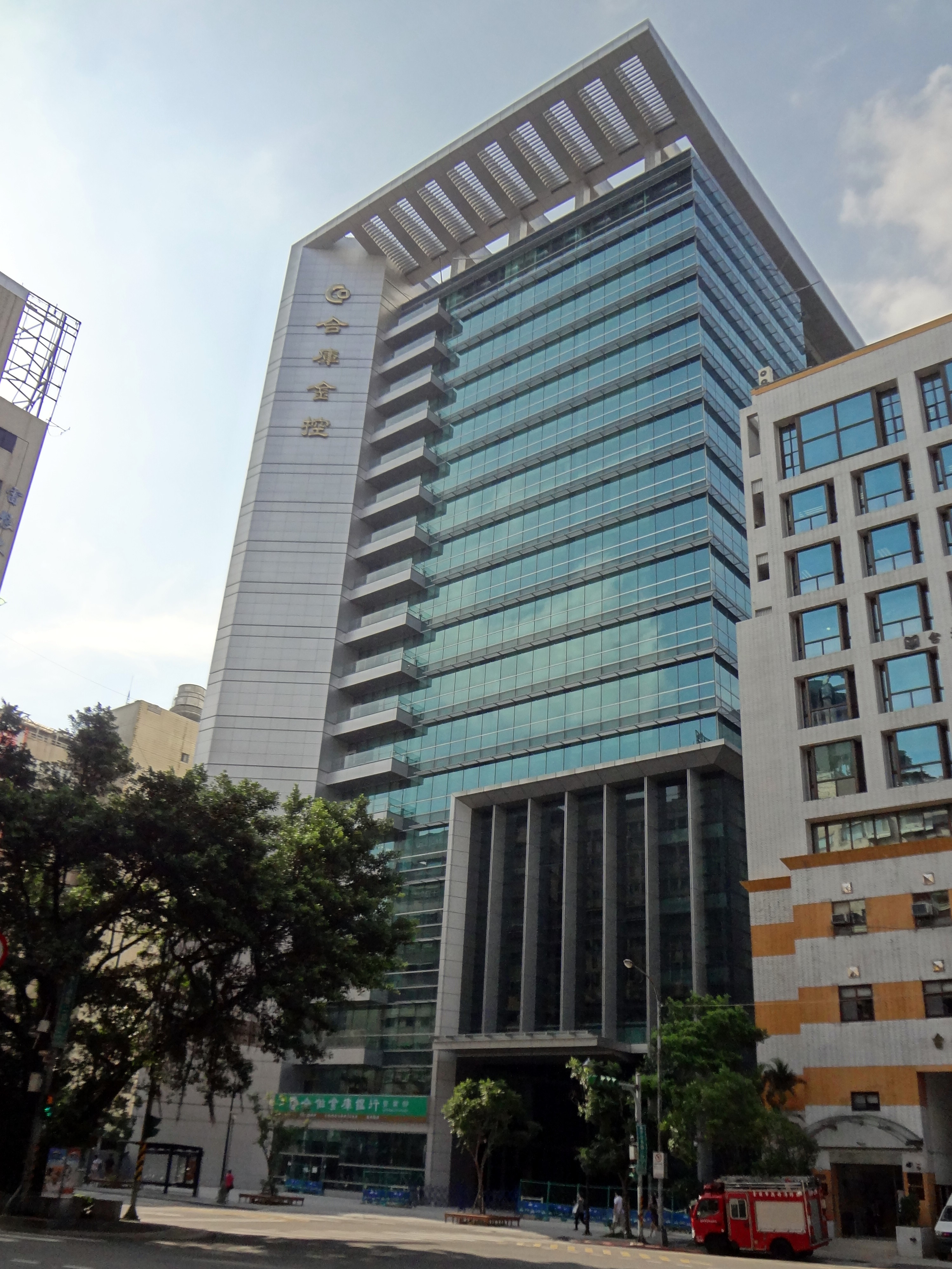 合庫金控暨合作金庫商業銀行總行大樓，位於臺北市松山區長安東路二段225號，拍攝時尚未啟用。